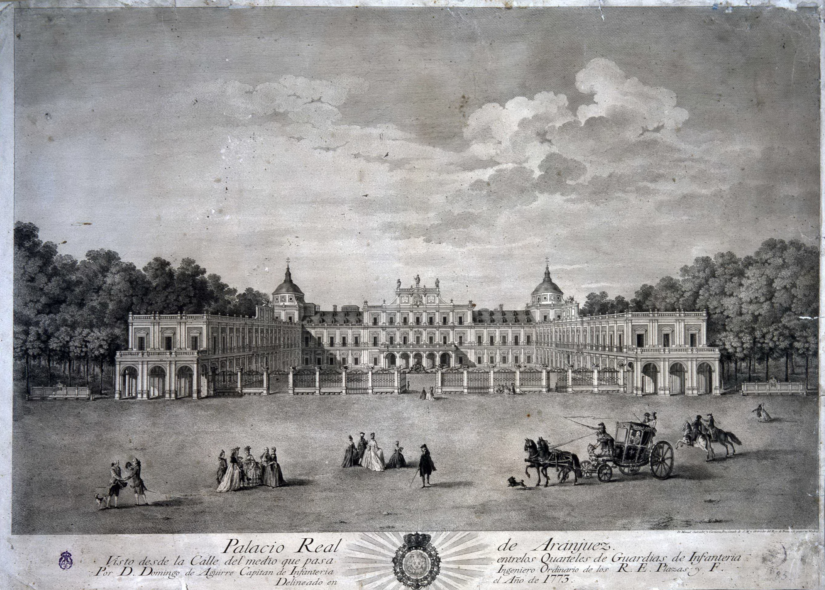 PALACIO REAL DE ARANJUEZ: Visto desde la Calle del medio que pasa entre los Quarteles de Guardias de Infantería / Por D. Domingo de Aguirre Capitán de Infantería... Delineado en el Año de 1773; D. Manuel Salvador y Carmona, pensionado de S. M. y Gravador del Rey de Francia, lo gravó en Madrid.